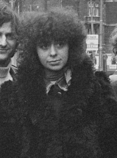 Persconferentie rond film "Alle dagen feest" in Amsterdam. 26 januari 1976. Marcelle Meuleman.